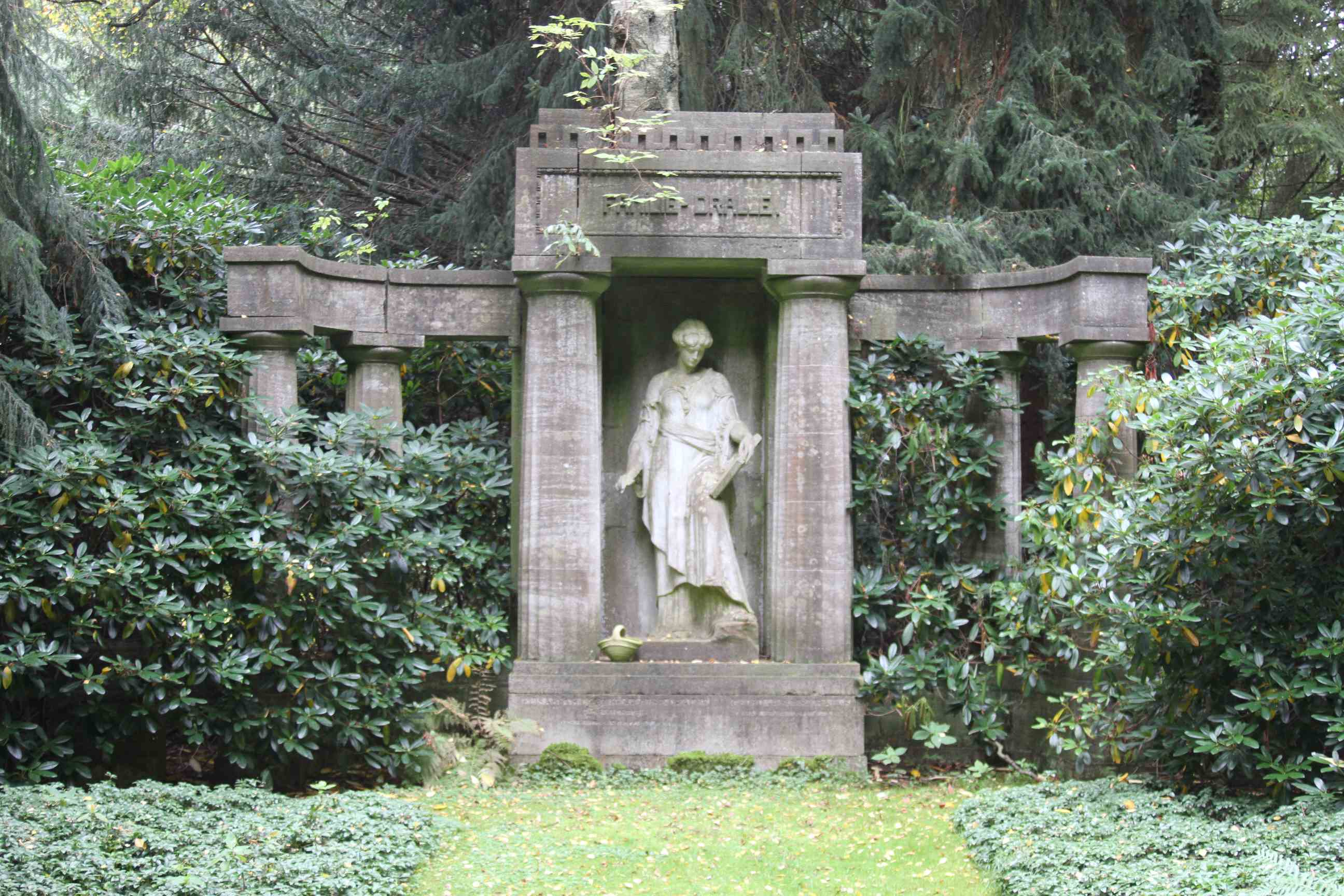 Das Unternehmen Georg Dralle Parfüm- und Feinseifenwerke wurde 1852 in Hamburg als Fabrik für Parfüm-, Seifen und andere kosmetische Artikel gegründet. Sie erlangte in der fast 140 Jahre andauernden Firmengeschichte Weltruhm. Letztlich wurde sie 1991 an die französische Firma L’Oréal verkauft.